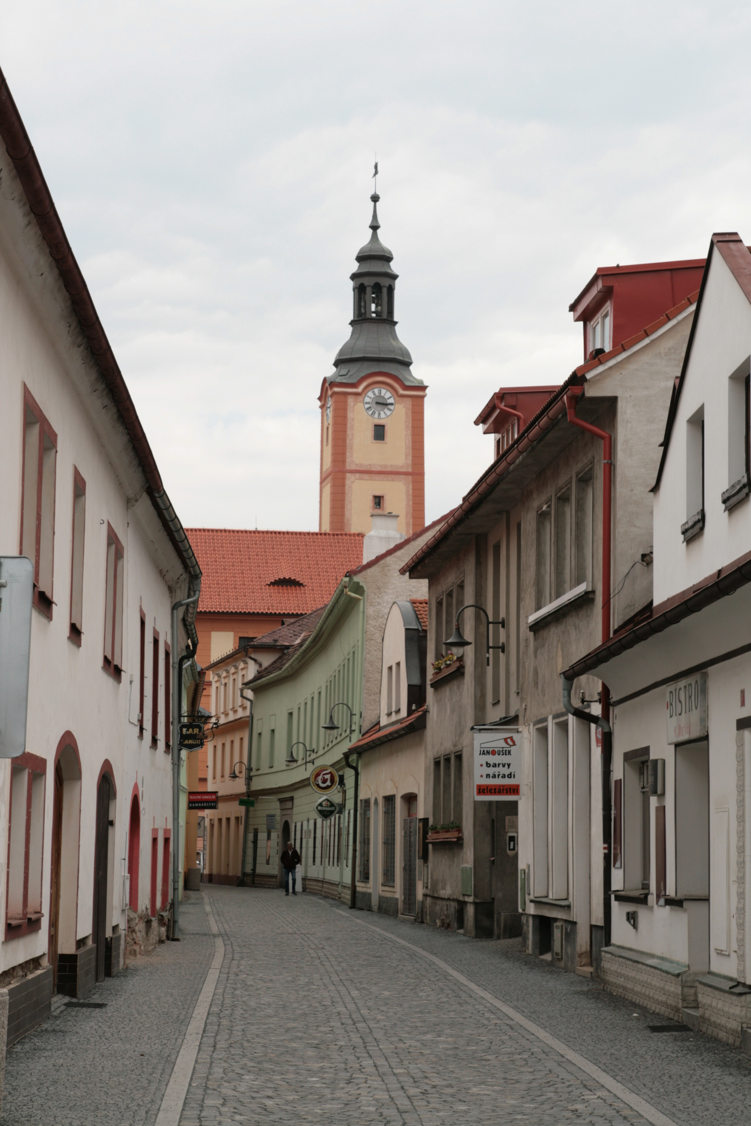 Město Sušice v okrese Klatovy. Klostermannova ulice v historickém centru.